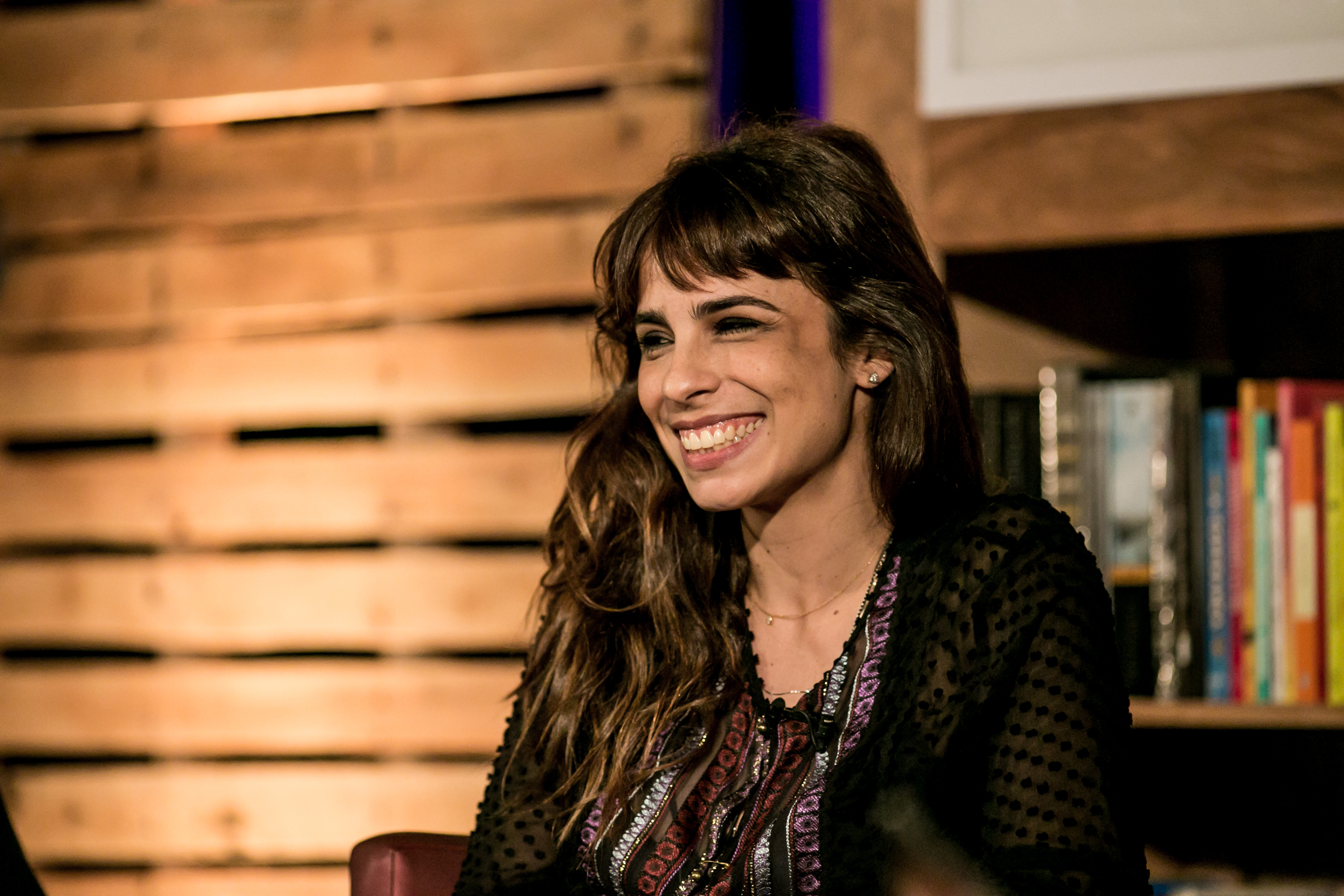 VOCÊ É O QUE LÊ A Noarr Cultura e Conteúdo, em parceria com a Livraria Cultura, promoveu a segunda edição do evento “Você é o que lê”, bate-papo com os autores Gregório Duvivier, Maria Ribeiro e Xico Sá. Representando a atual cena literária, jornalística, artística e cultural brasileira, o trio conduziu com bom humor uma conversa com o público sobre o mundo da leitura como espelho do mundo contemporâneo. “O leitor da política e do futebol são muito parecidos, pela passionalidade”, afirma Xico Sá durante o evento “Você é o que Lê” em Brasília, Xico também afirmou: “A nossa falta é de leitura, não de grandes autores. “As pessoas não entendem o que elas leem, é um problema de interpretação de texto”, disse Gregorio Duvivier que completa: “O problema no Brasil não é falta de informação. É a qualidade da informação”. Gregorio também fala sobre cultura: “Dizem que hoje temos cultura. Não temos. Porque cultura sem democracia não é cultura!” Quando o assunto é internet e discursos de ódio, Maria Ribeiro discorre: “As pessoas mais agressivas nas redes são as que tem perfil ‘do bem’: mãe de família, cristã”. Fotos: Mídia NINJA (CC BY-SA 4.0)